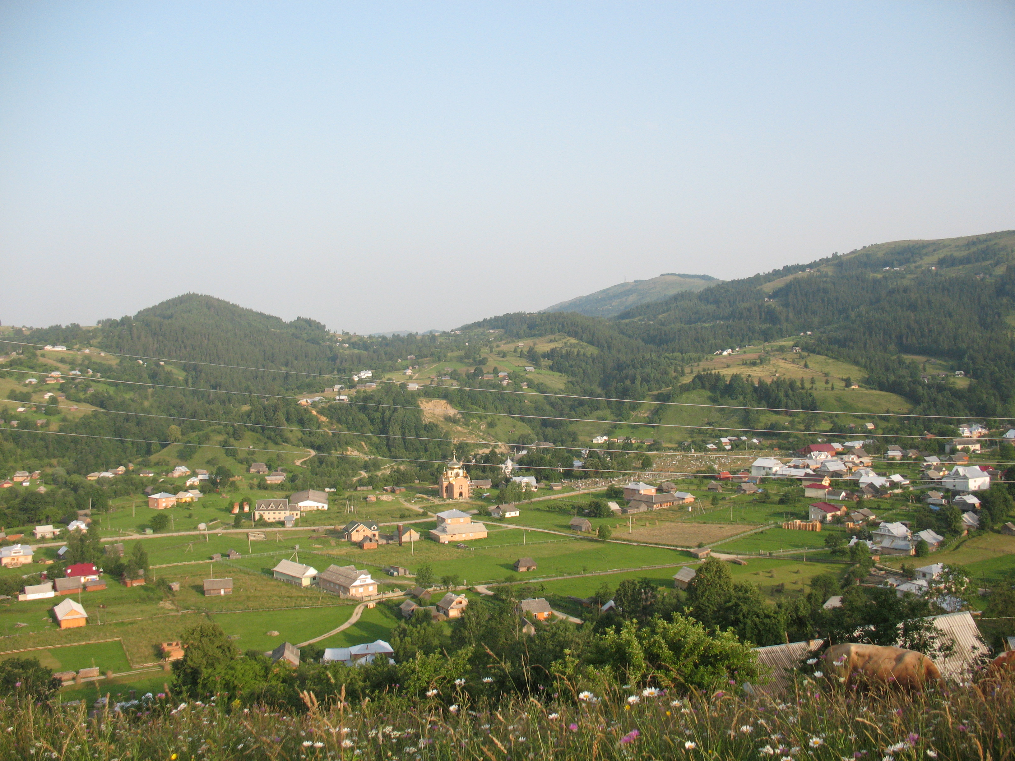 Село Брустурів у Косівському районі Івано-Франківської області України